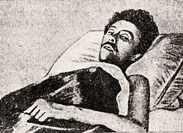 Ignatij Nikolaevič Ivičevič (1857-1879) ritratto poco prima della morte